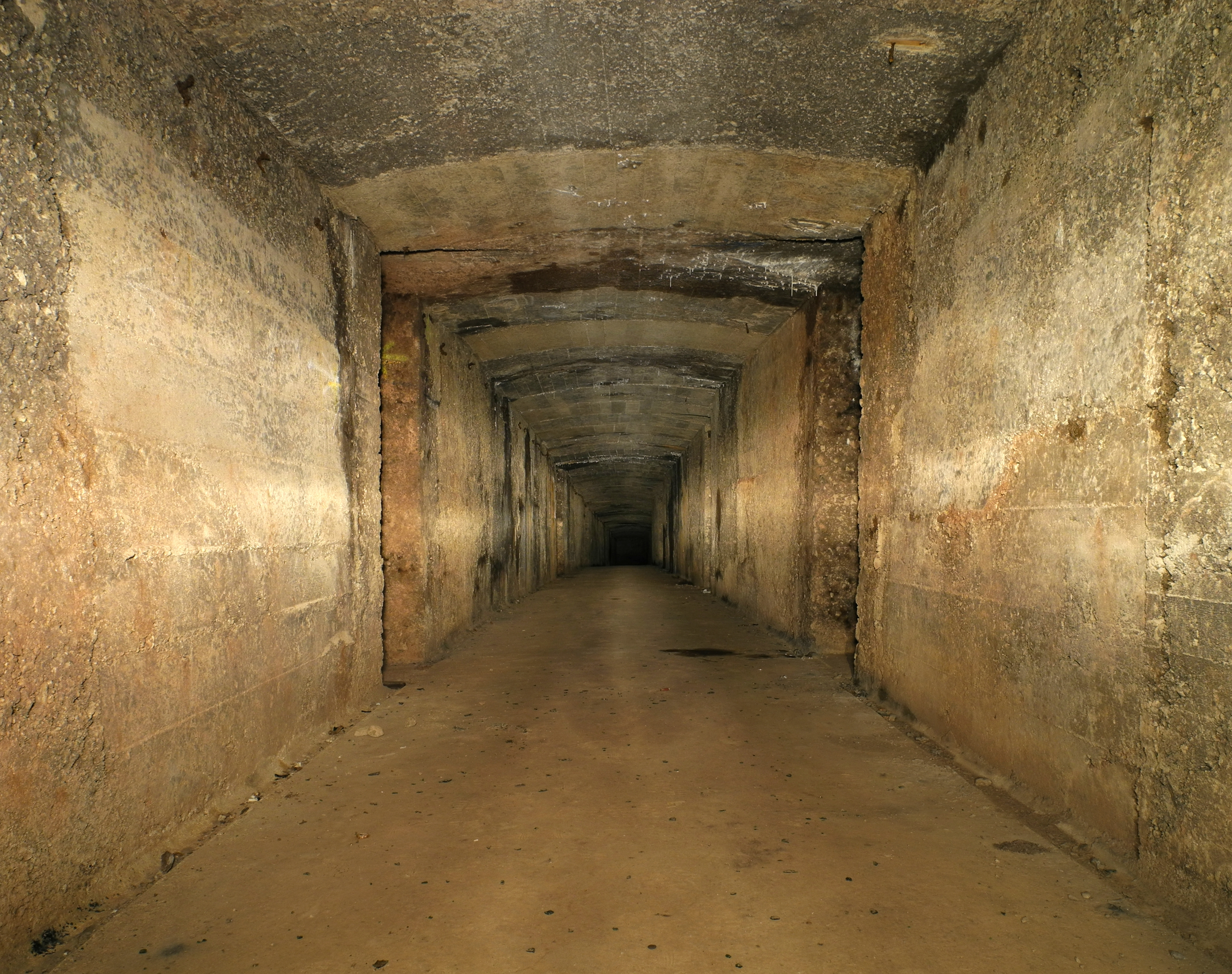 Le casernement souterrain (situé sous le casernement de guerre (bétonné)). Roppe fortifications, underground galleries (lightpainting).